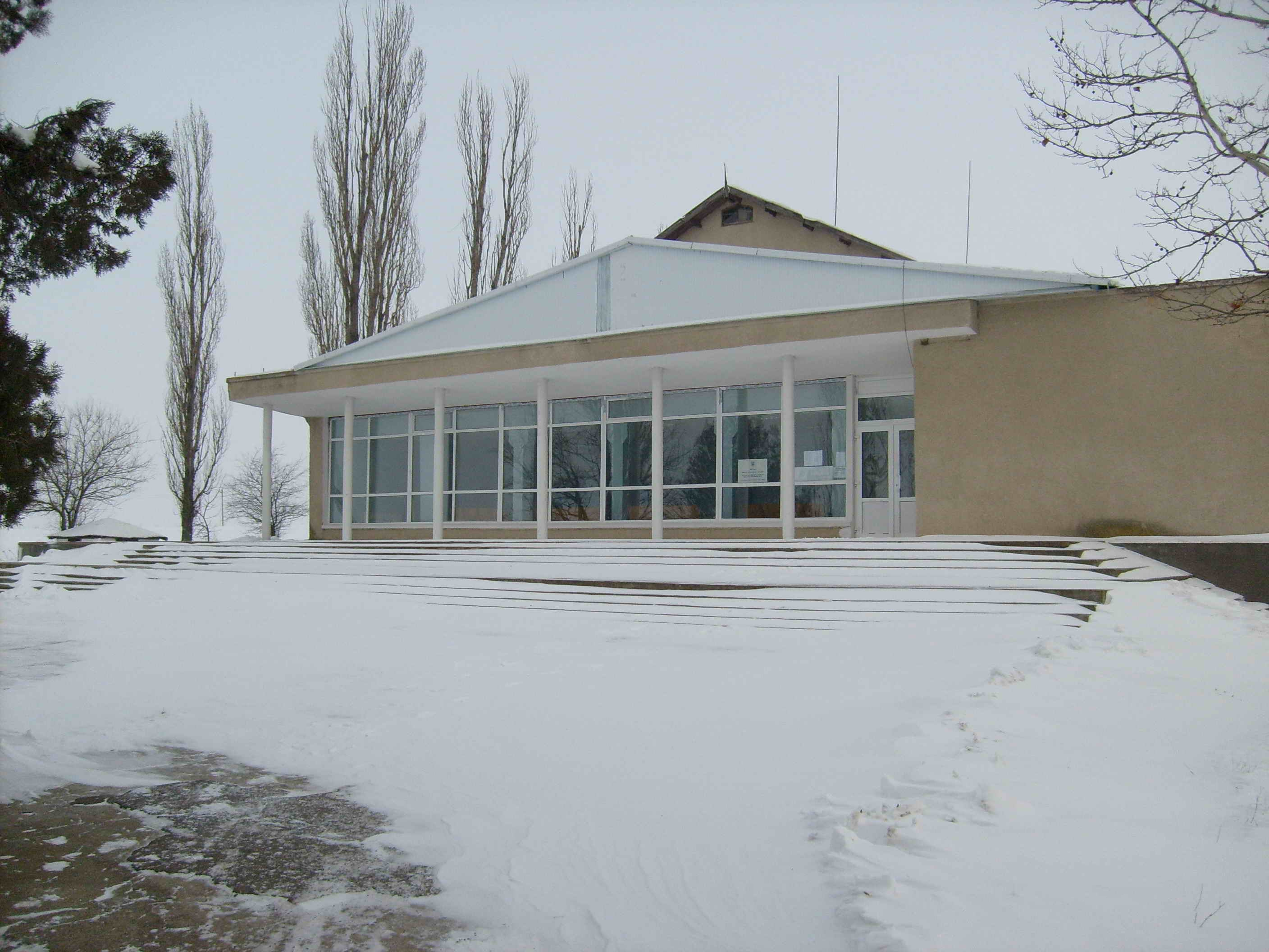 Дом культуры. Златоустово (Одесская область)